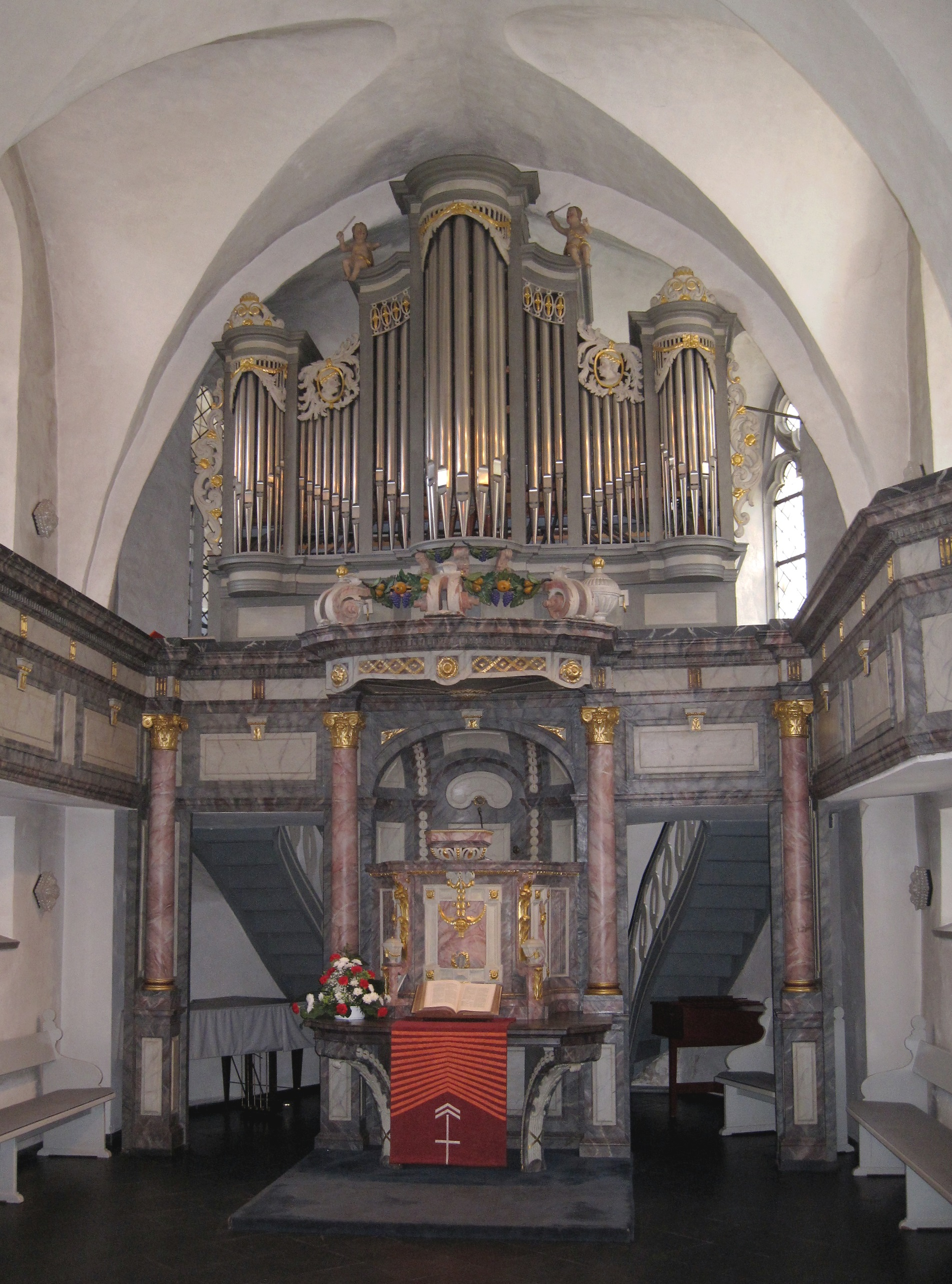 Evangelische Altstadtkirche, Kirchstraße 12 in Bergneustadt. Erbaut 1698.